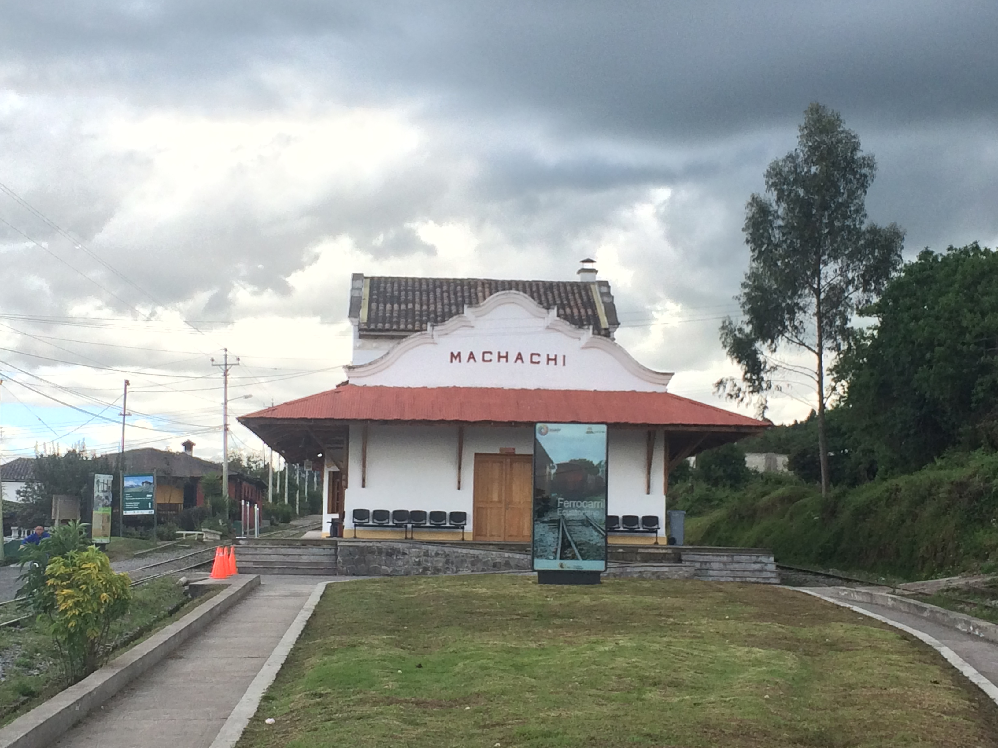 Estação de Trem de Machachi - Quito, Equador